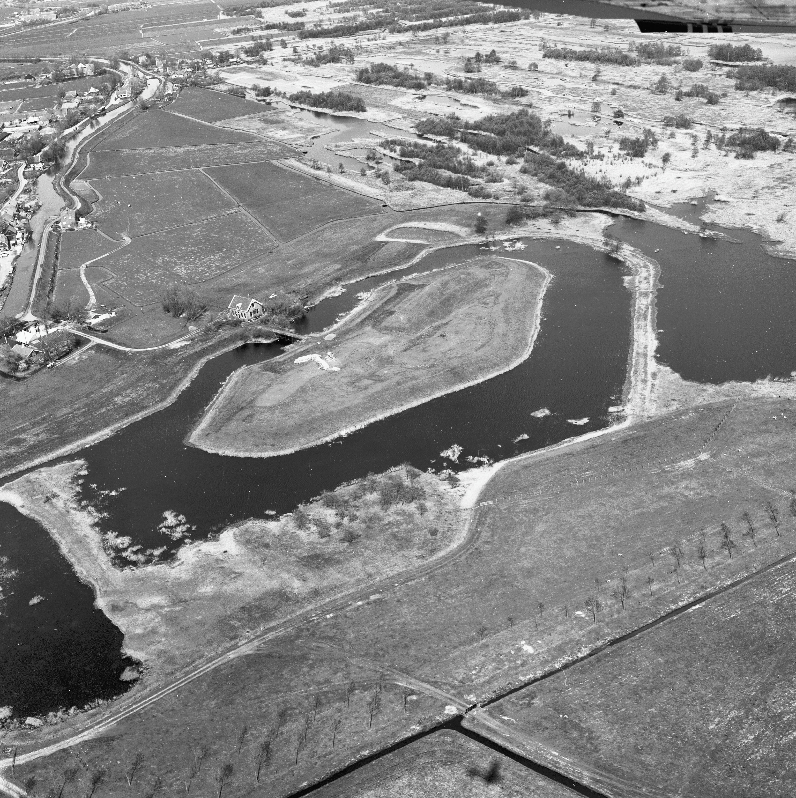 Overzichten: luchtfoto